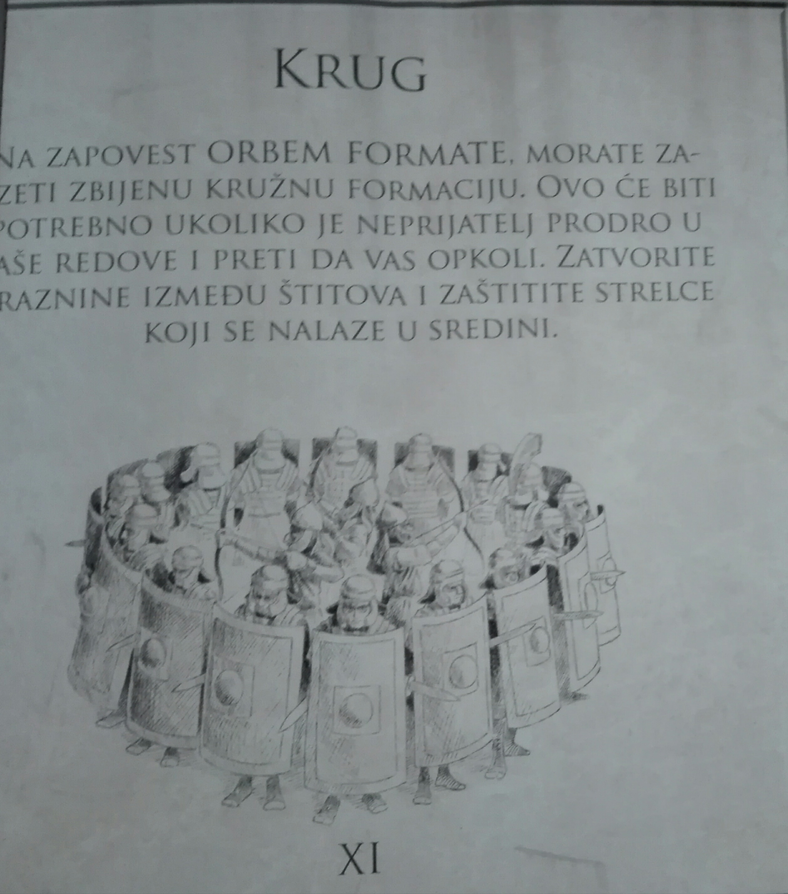 Формација круг